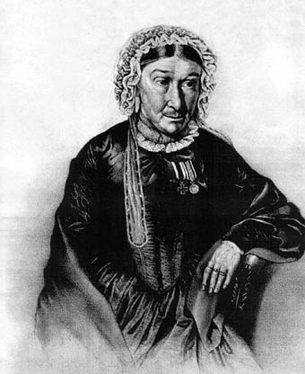 Портрет героини войны с Наполеоном 1812 - 1815гг. Луизы Кессених, 1852год. Литография Александра Мюнстера по рисунку И.С.Щедровского